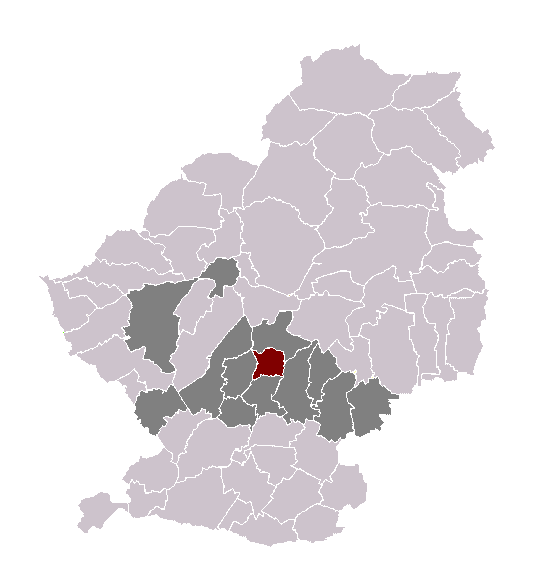 Loffre dans son canton et son arrondissement